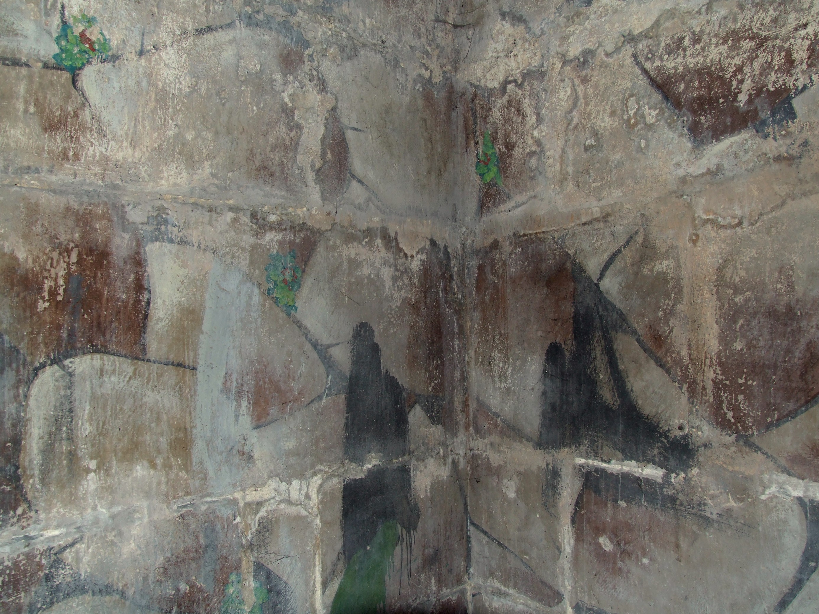 Kaplica Grobu Pańskiego w Żaganiu - pozostałości polichromii na ścianach komory grobowej